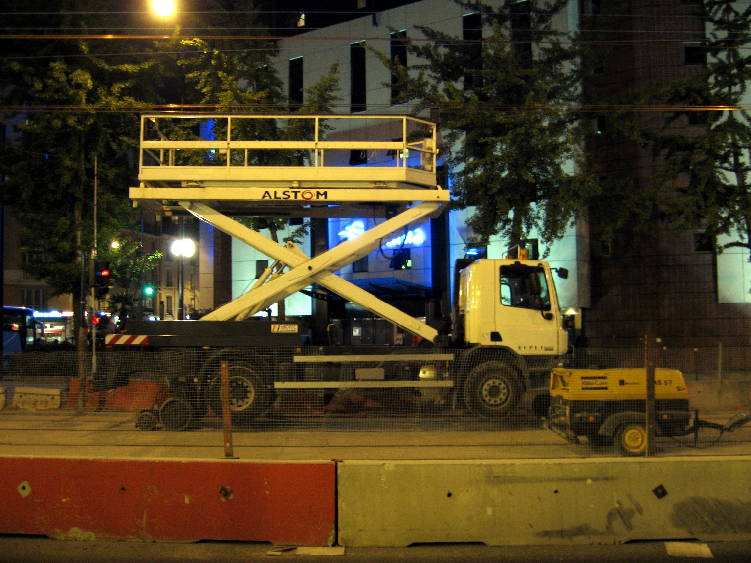 Pose de la LAC de l'extension sud de la ligne 2 du tramway d'Île-de-France à Porte de Versailles